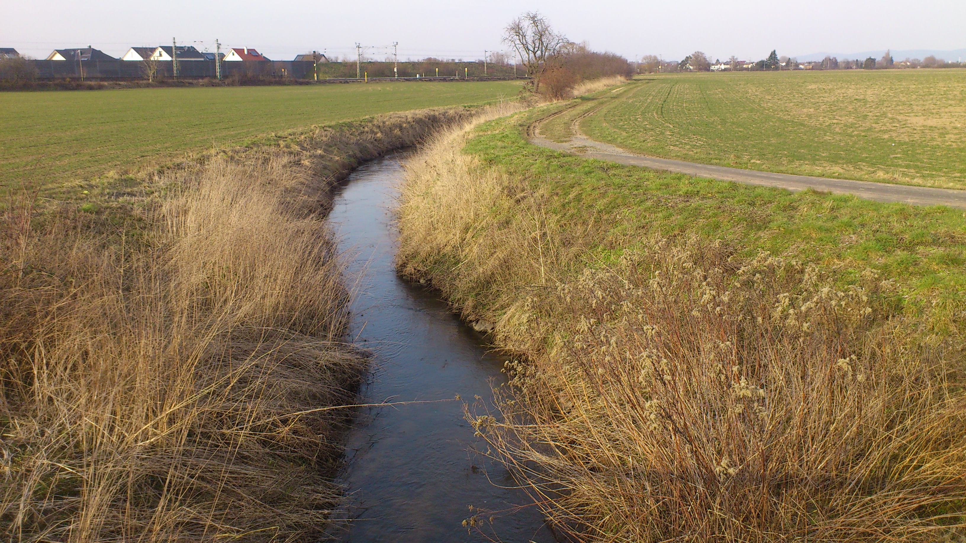 Der Ohlebach bei Hergershausen